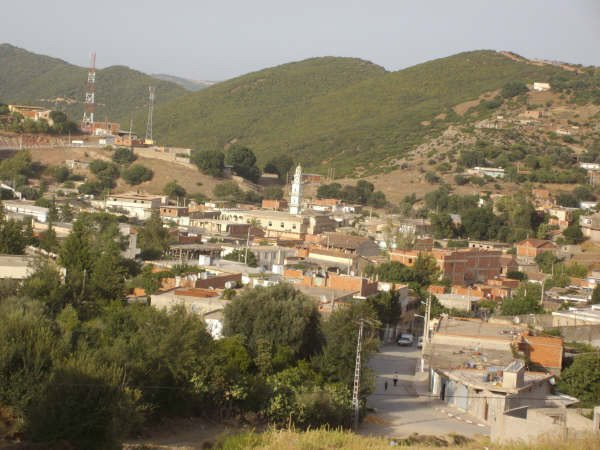 Commune de la wilaya de Guelma